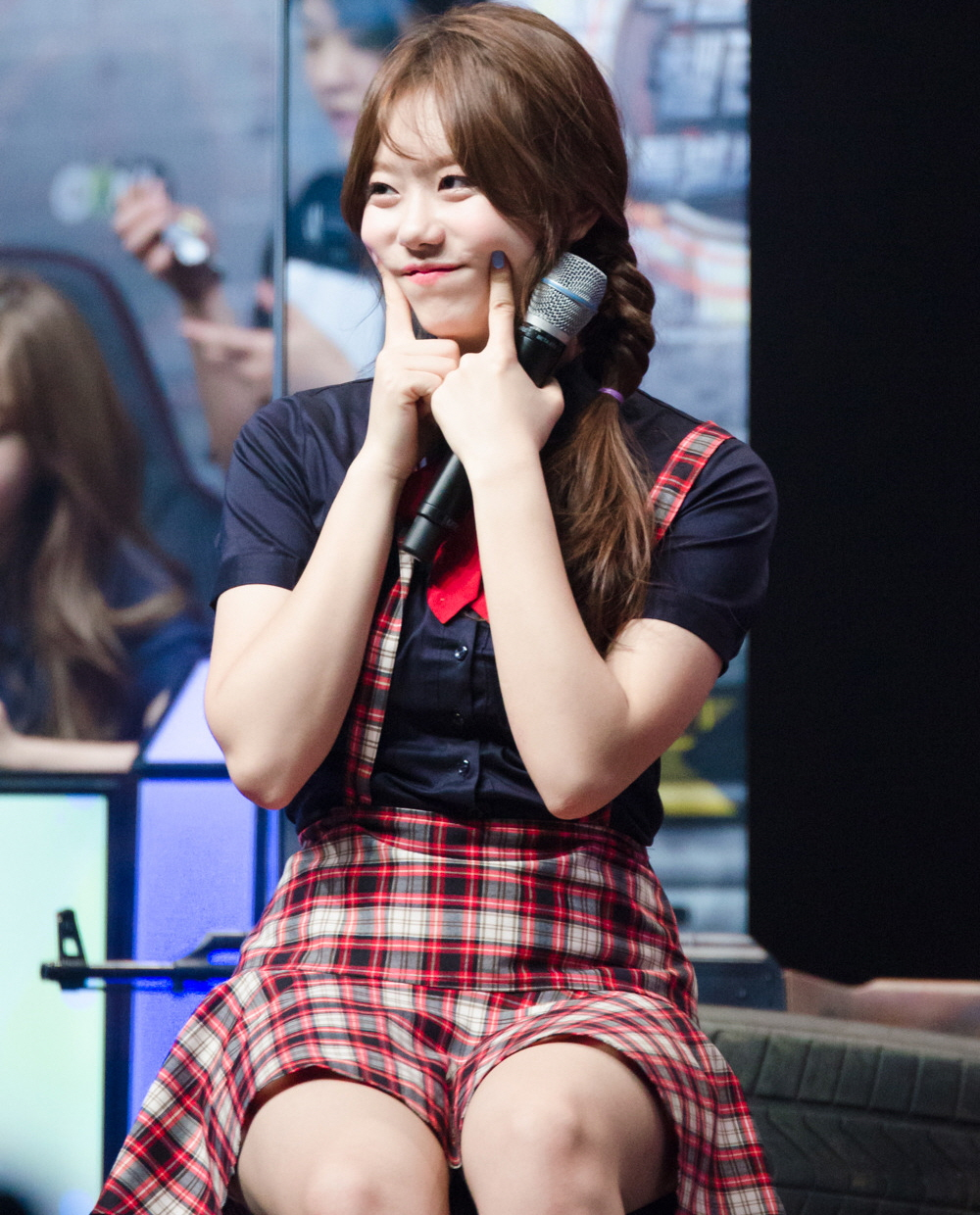 160521 백발백중